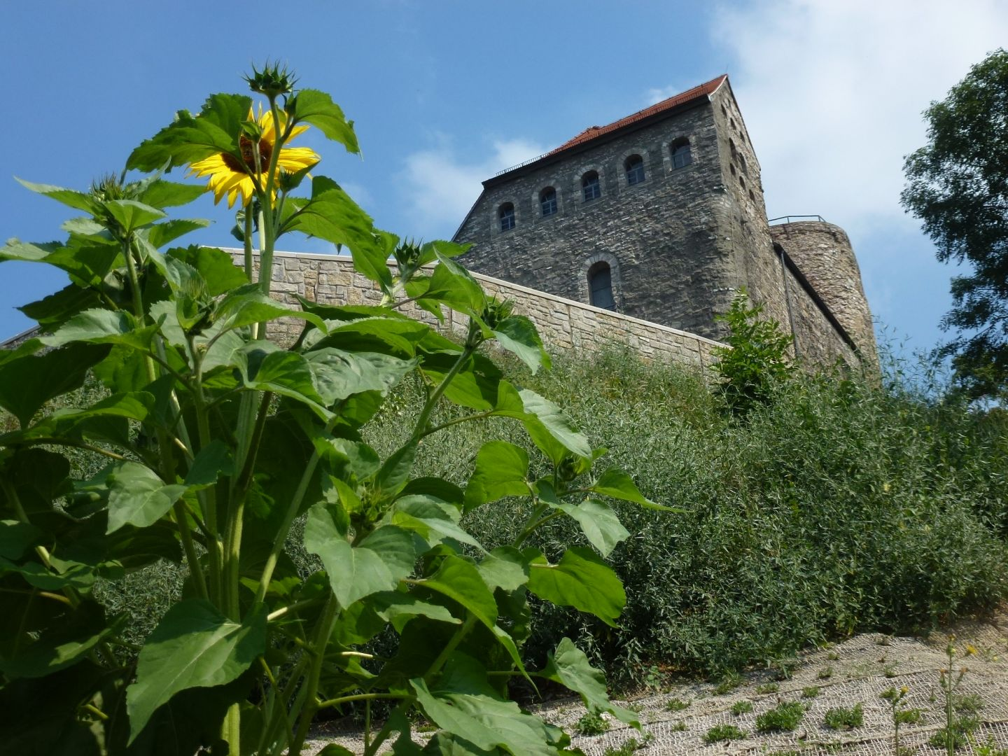 Hausmannsturm